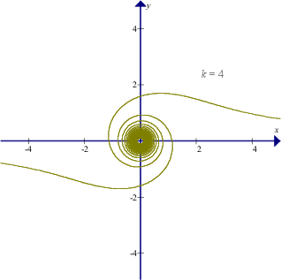 连锁螺线的例子 (--created by myself--)